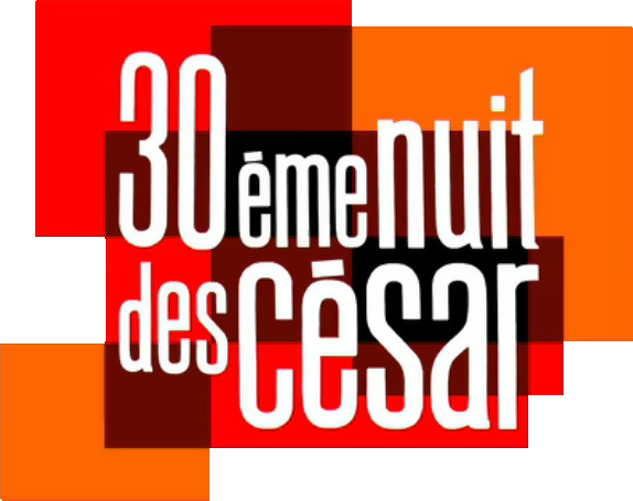 Logo de la 30e cérémonie de César